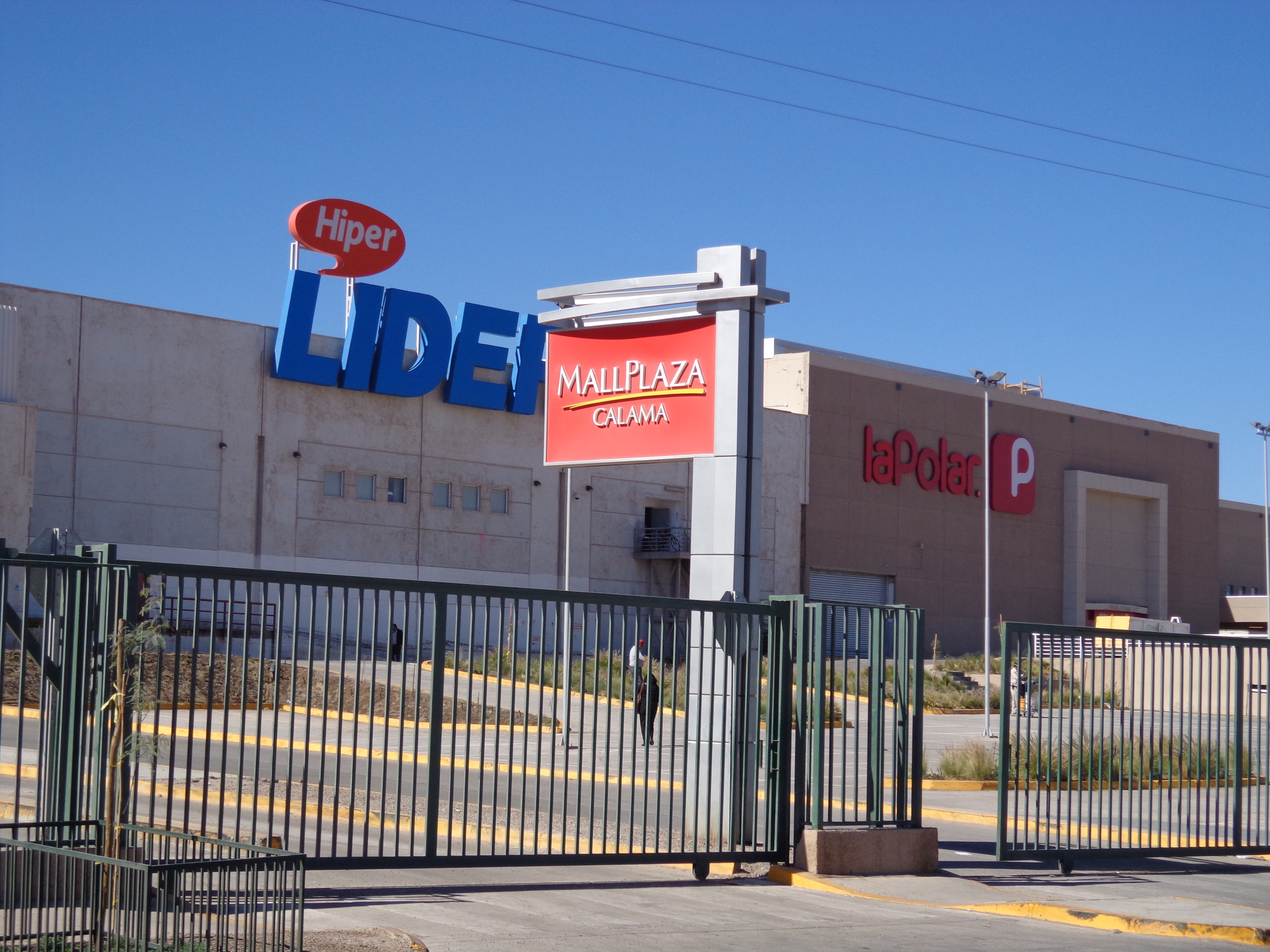 Fotografía de Fachada del Mall Plaza Calama en su parte trasera.